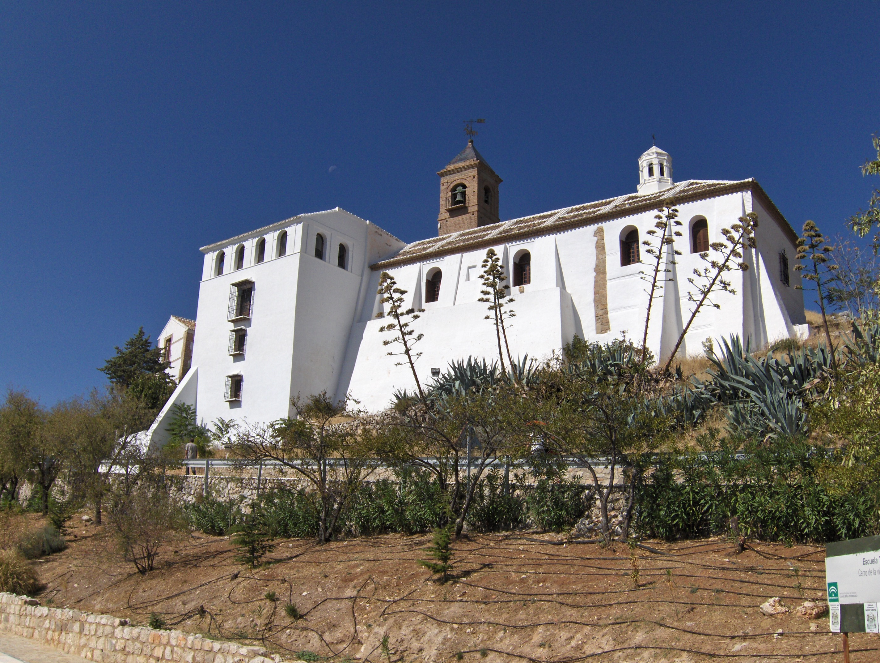 Ermita de la Virgen de Gracia, Archiona, Spain.